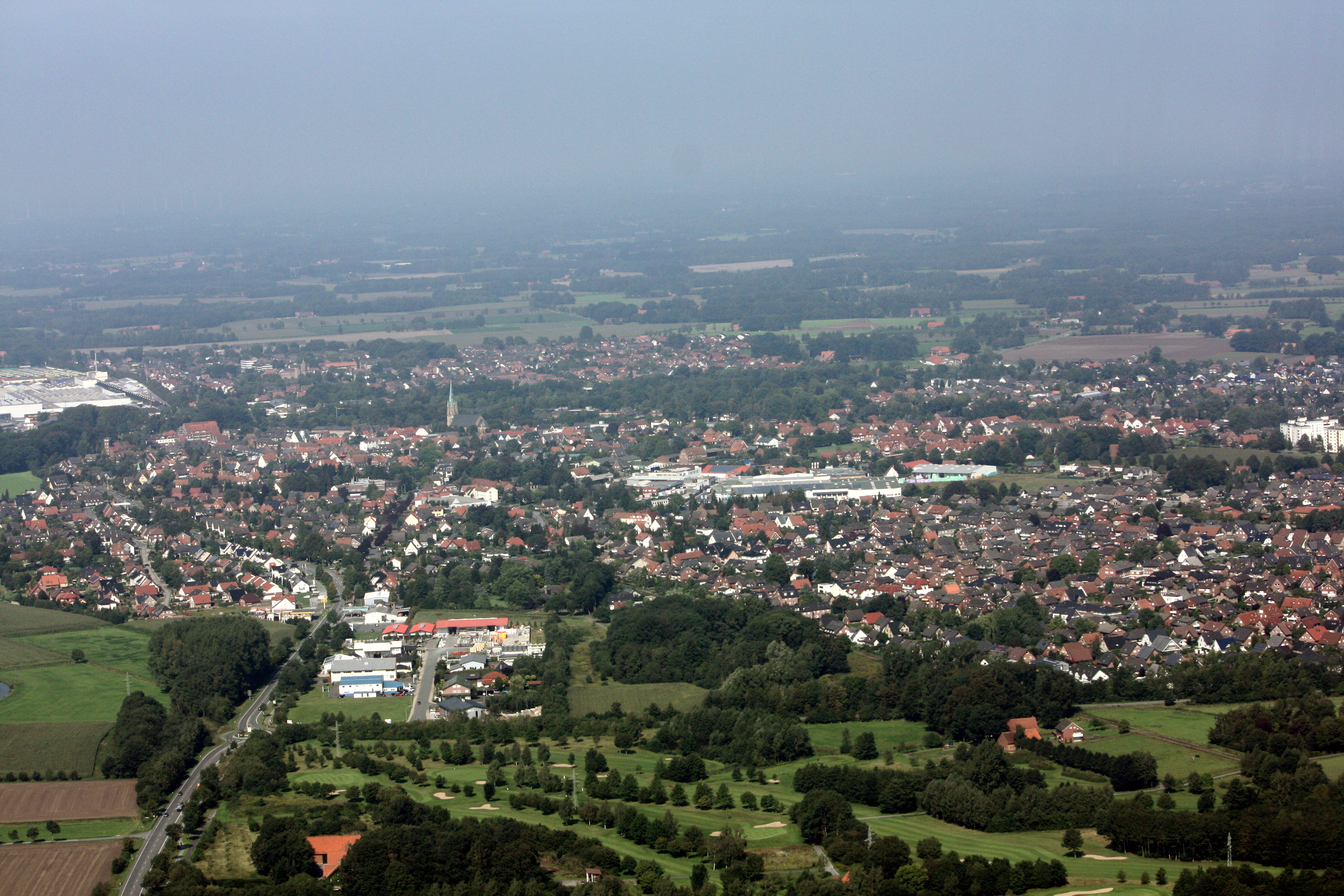 Luftbild der Stadt Harsewinkel, Kreis Gütersloh